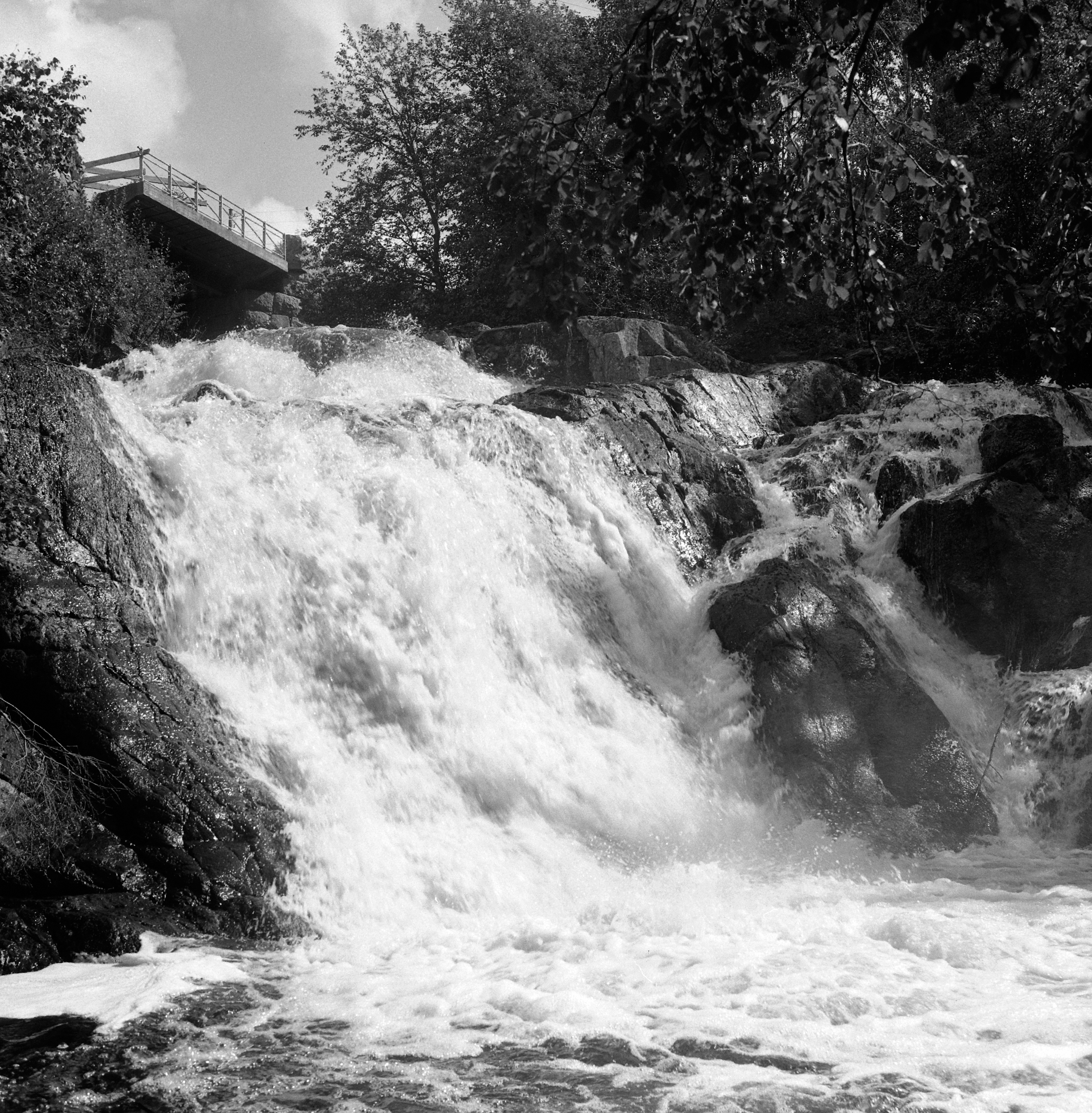 Viksfossen ved Tangen i Stange, Hedmark